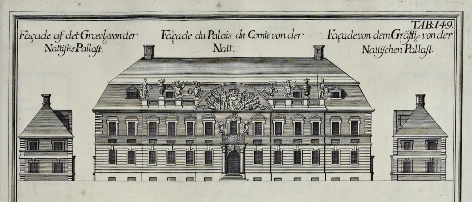 Palais Dernat in Schleswig (1868 zerstört), aus: Den danske Vitruvius, Band 2, Tafel 149